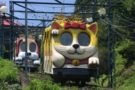 ラクテンチのケーブルカー